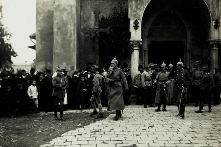 Felix Graf von Bothmer